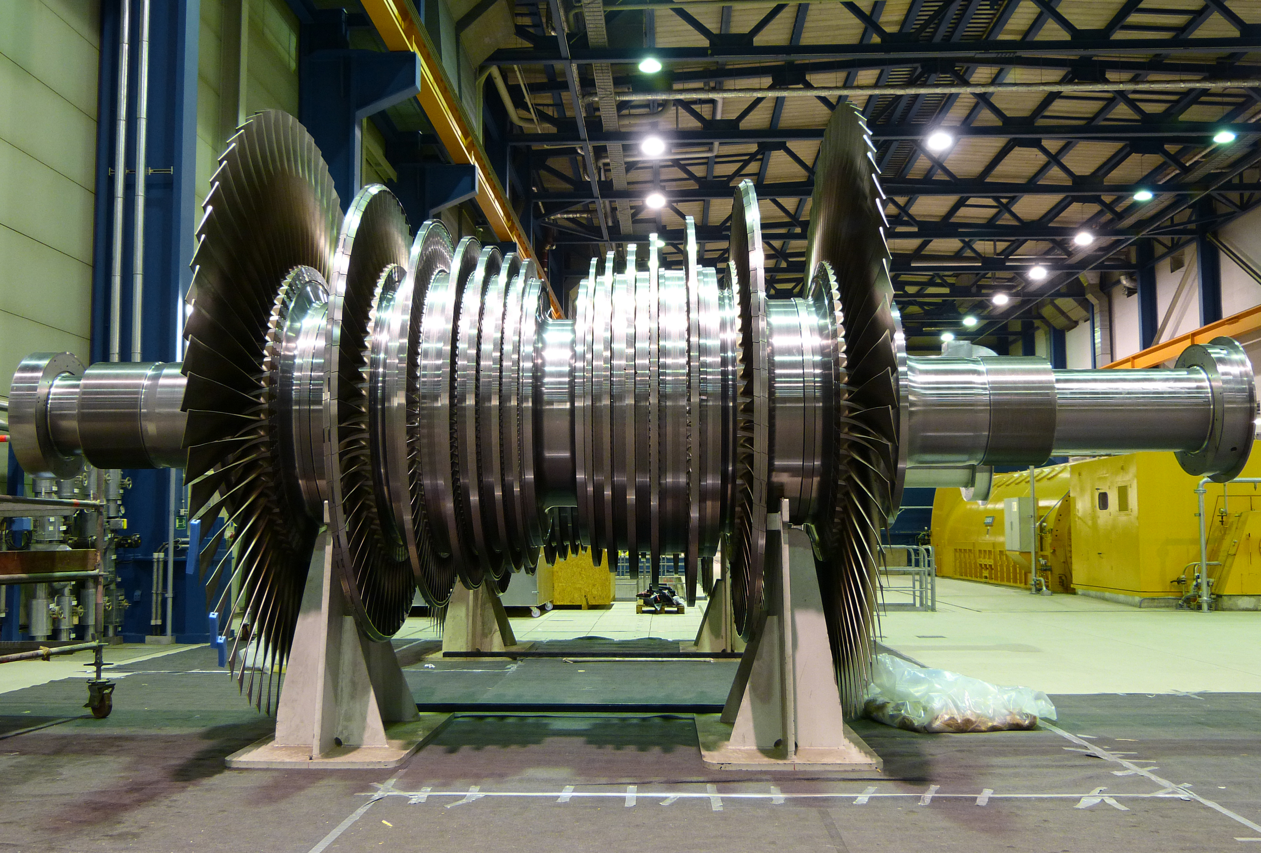 Niederdruck Läufer im Kraftwerk Schwarze Pumpe